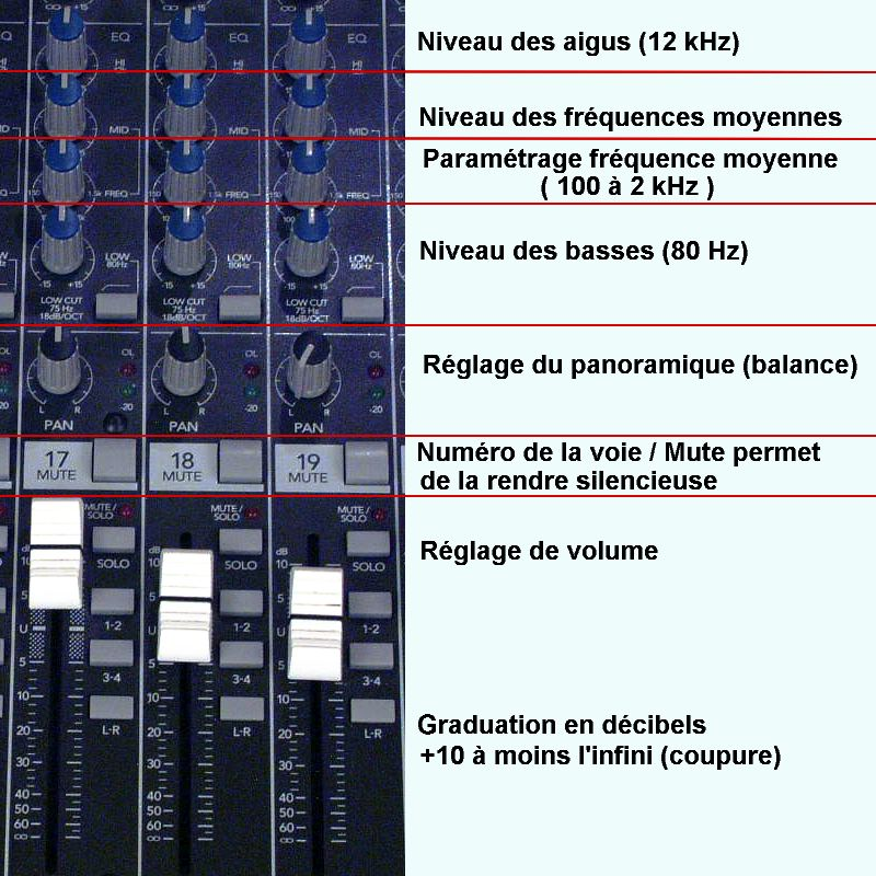 Principaux réglages disponibles sur une voie de table de mixage - réalisation personnelle décembre 2004 à partir d'une photo origine du domaine public (no usage restriction), republié en GFDL pour Wikipedia